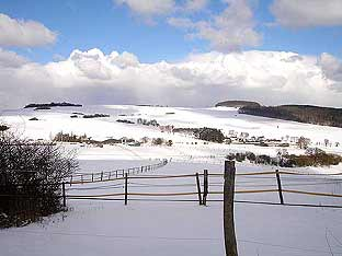 Hühnerküppel im Winter - Blick aus Süden